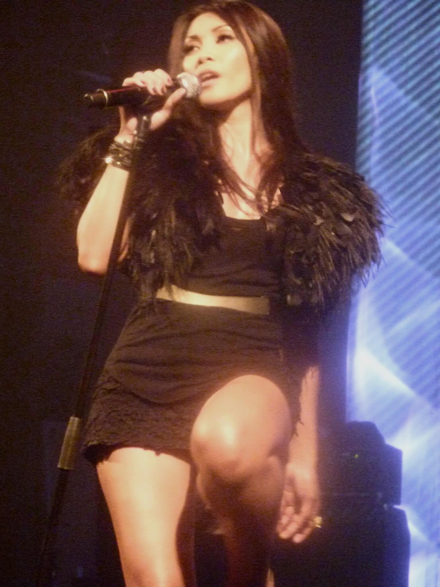 La chanteuse Anggun en concert au Trianon à paris en juin 2012